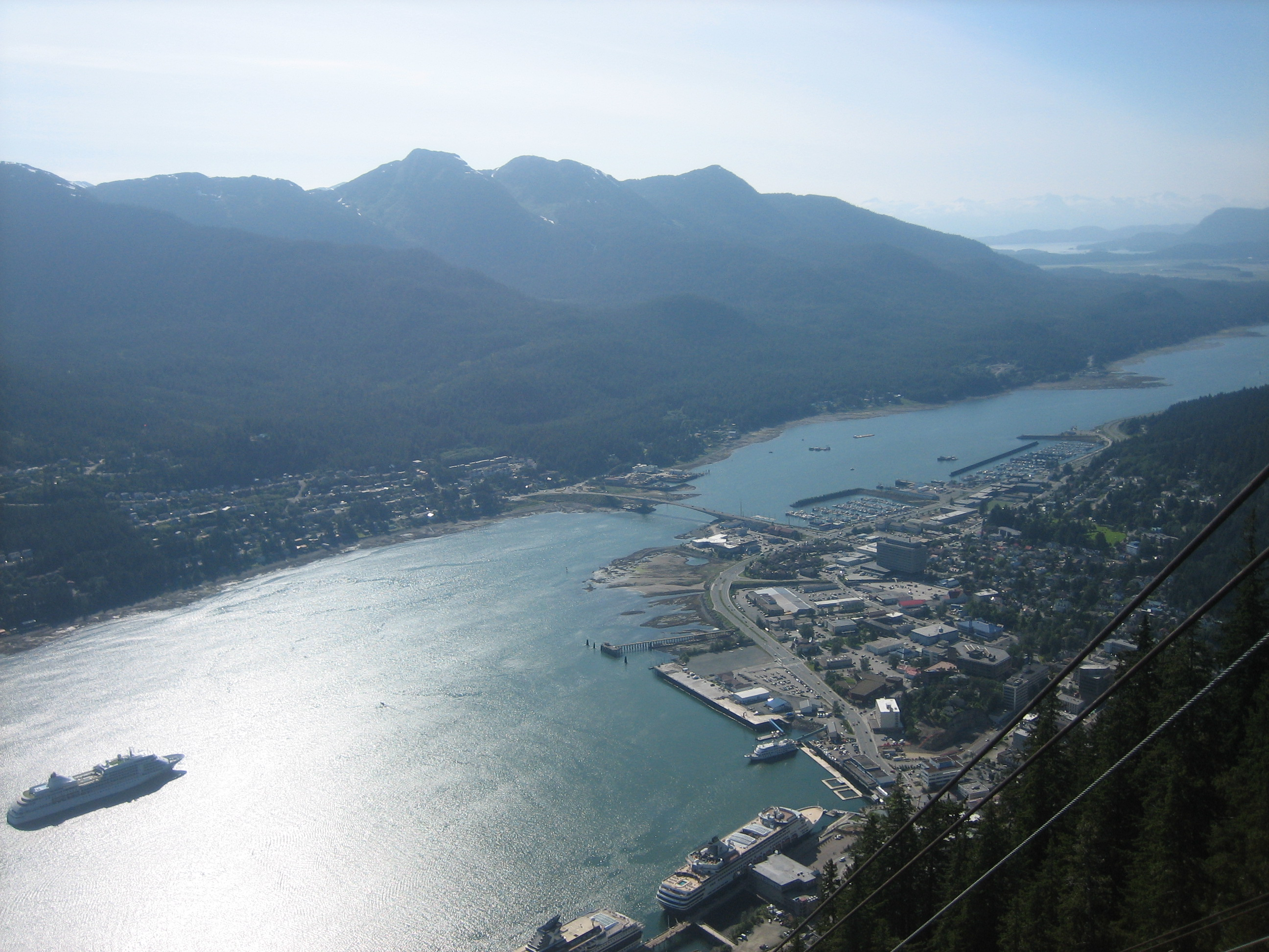 Juneau and Gastineau Channel, Alaska